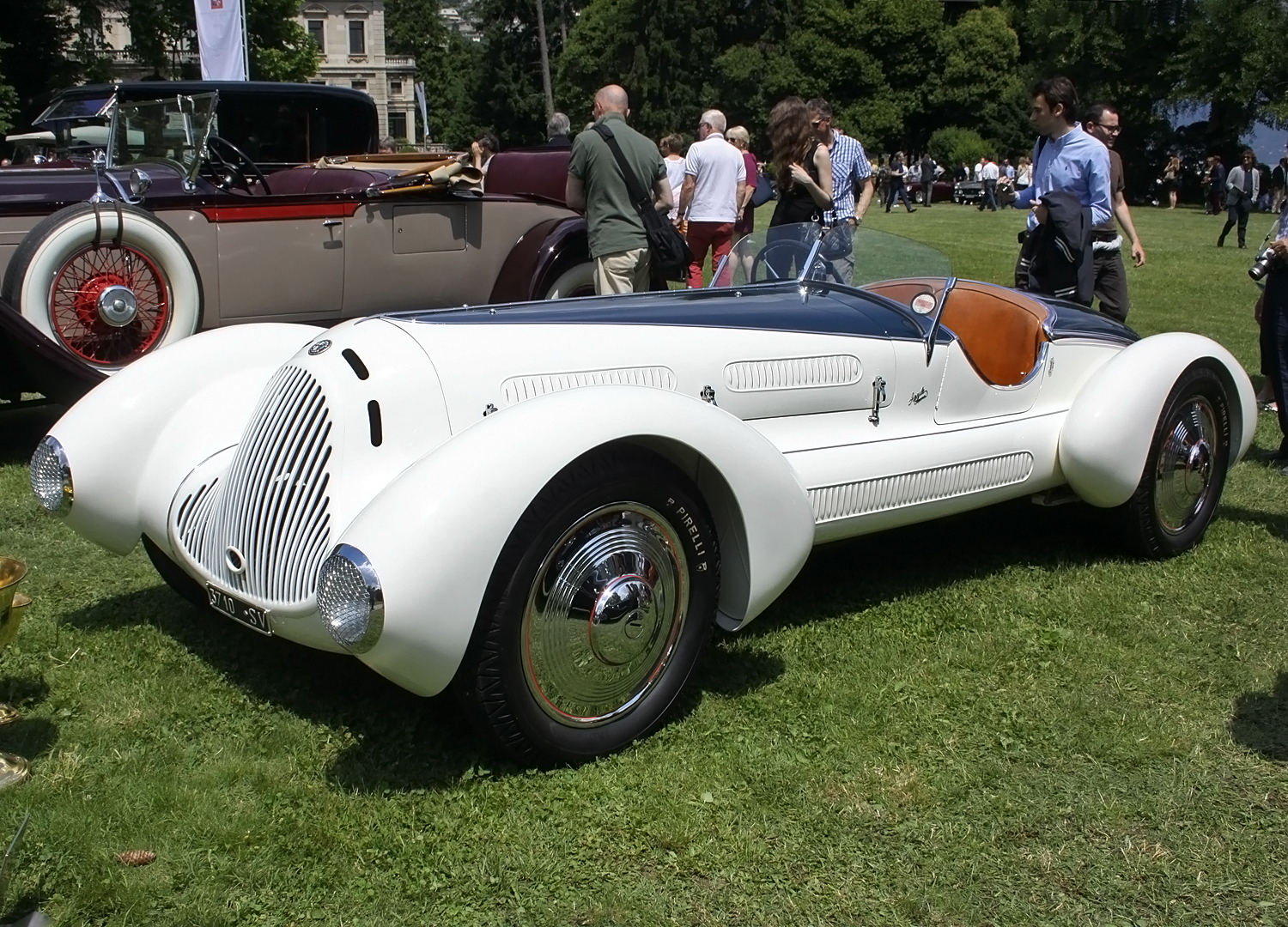 1931 Alfa Romeo 6C 1750 GS Spider Zagato at Concorso d'eleganza Villa d'Este 2014.